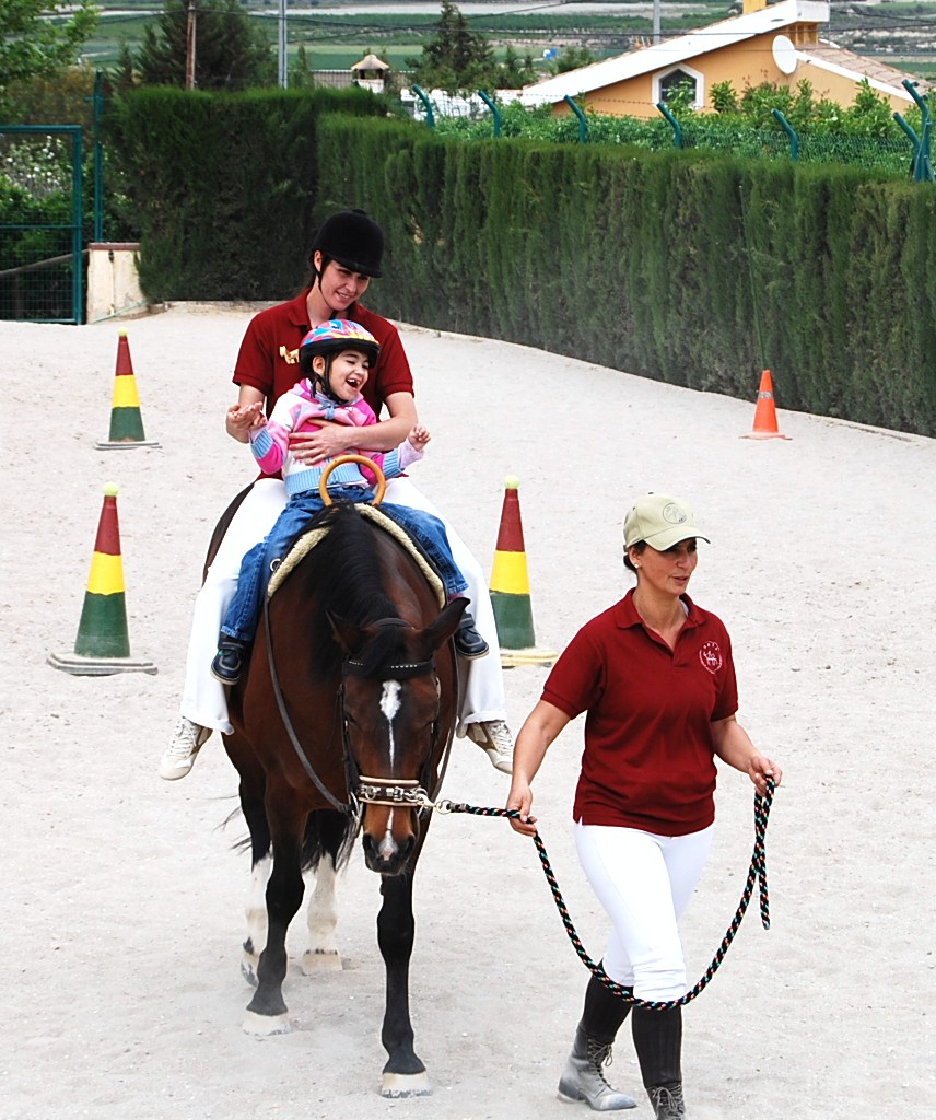 Interacción con el caballo